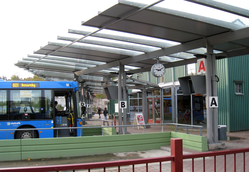 Mölnlycke resecentrum, Härryda kommun